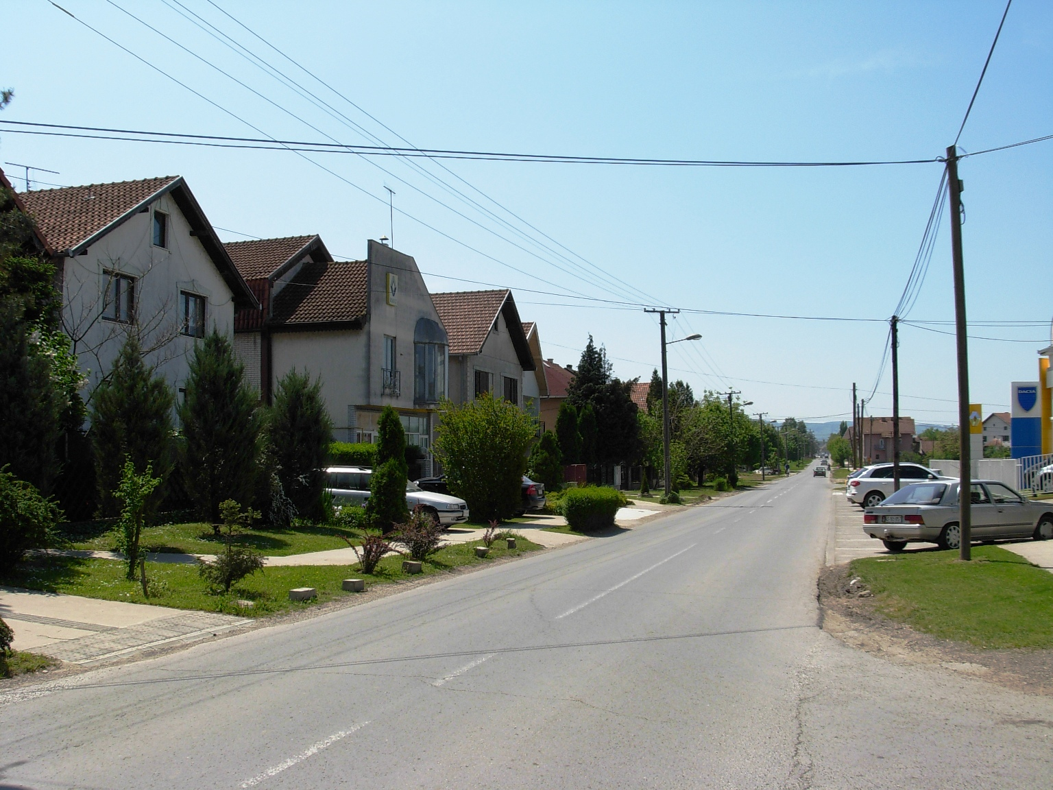 Ulica Kralja Petra I u Veterniku.